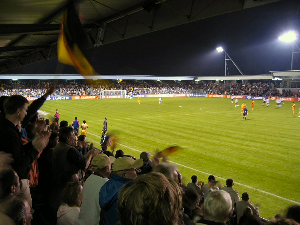 Wilhelmshaven Jadestadion, U21-Länderspiel der deutschen Nationalmannschaft.